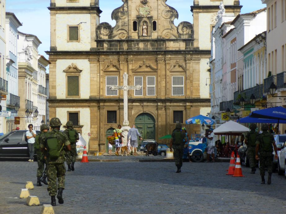 Polizeistreik 2014